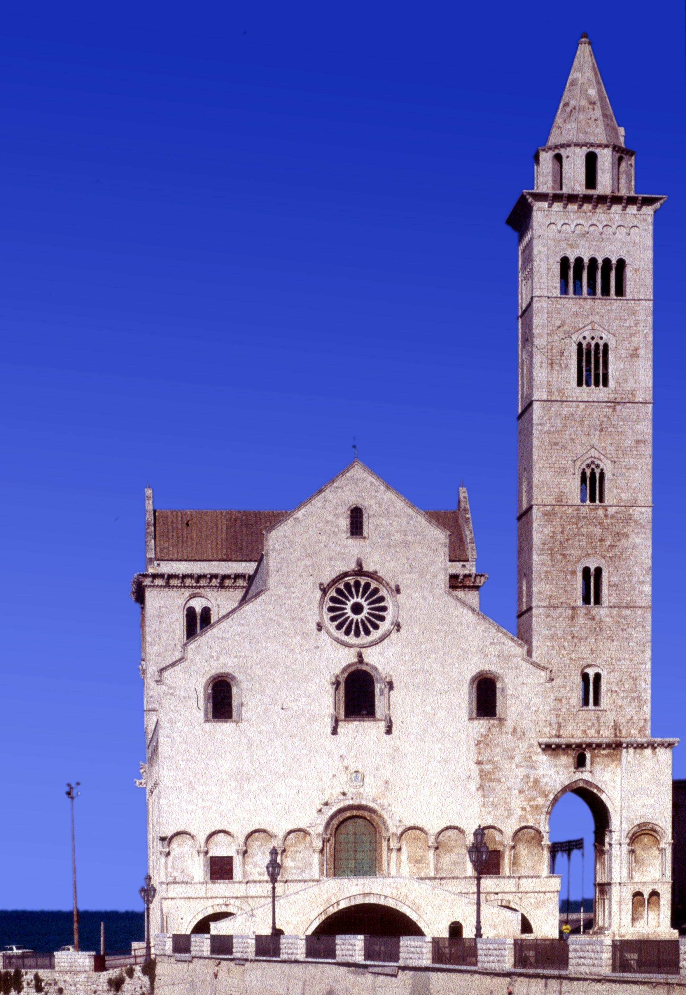 Dom von Trani in Apulien